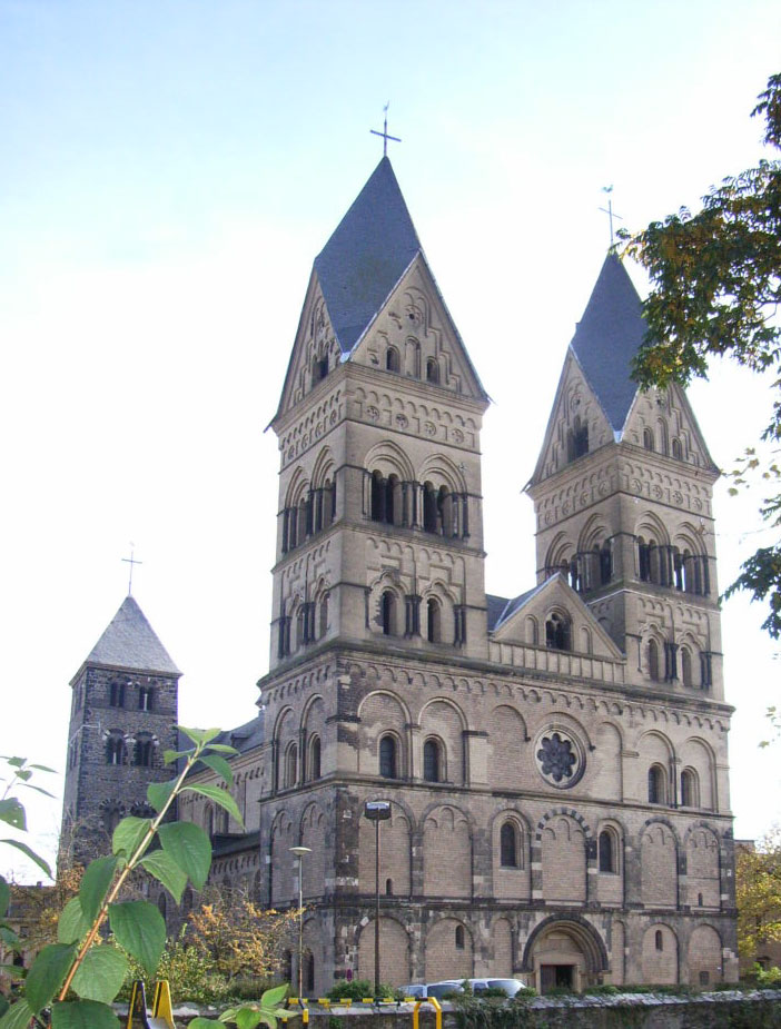 Kirche Maria Himelfahrt in Andernach}{en